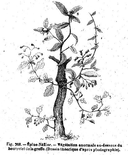 Crataegomespilus